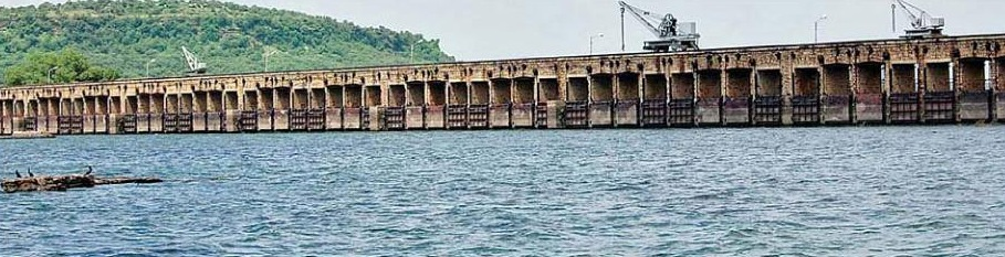 Tigra Dam